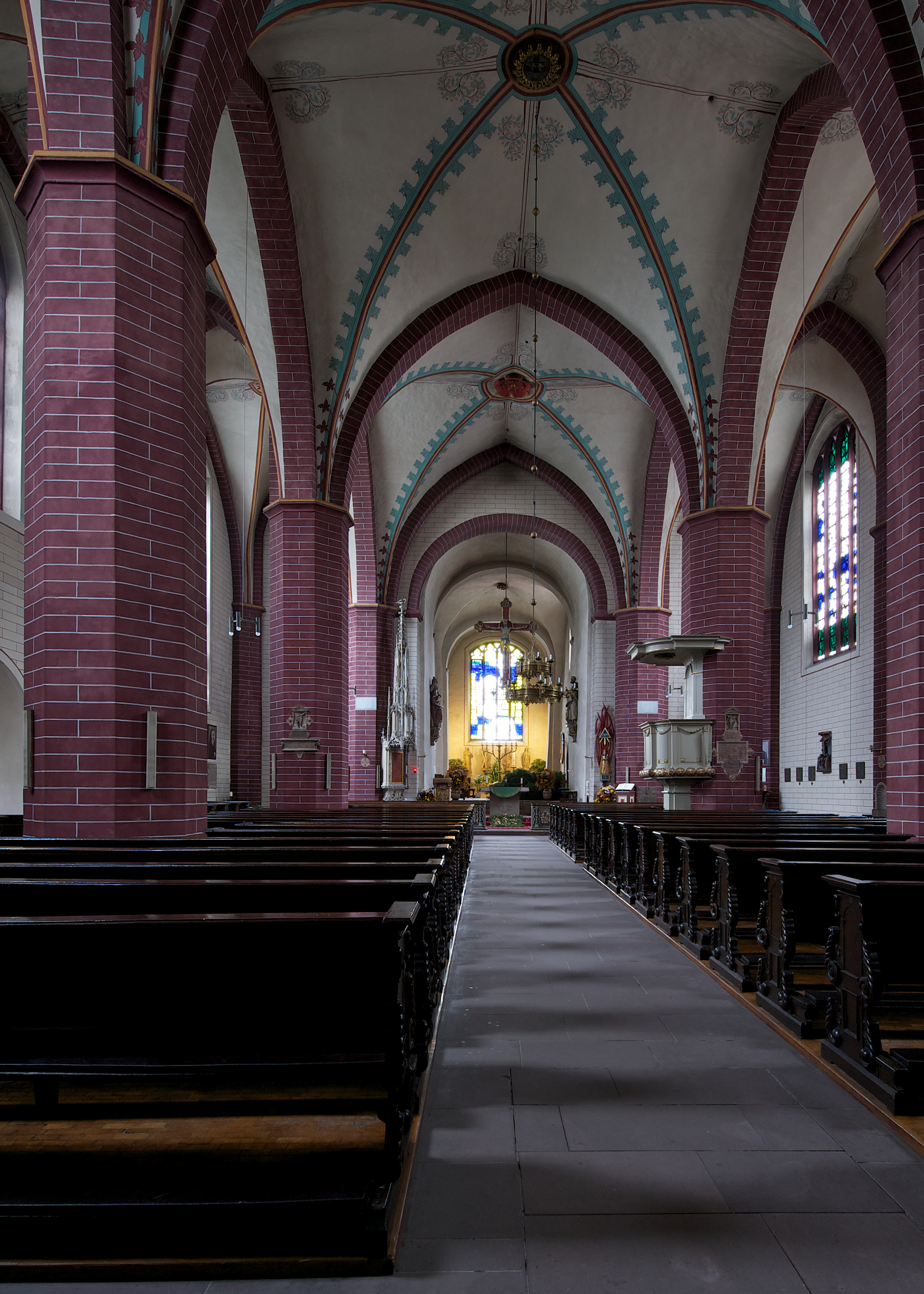 Busdorfkirche (innen)